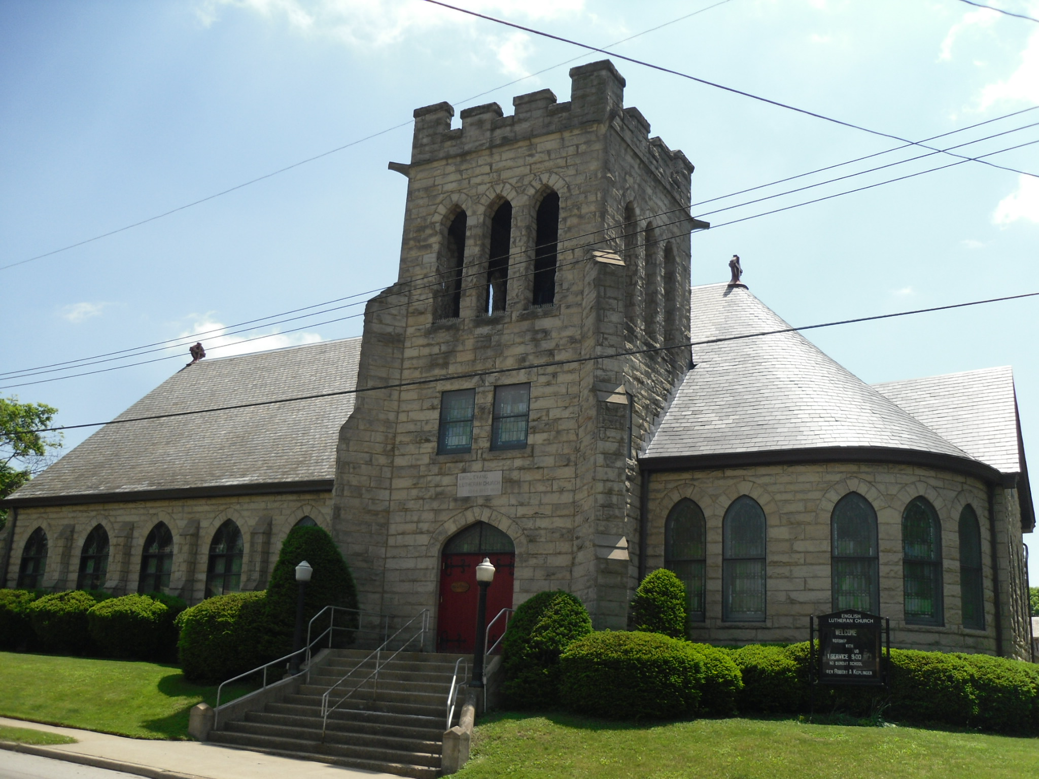 Zelienople, Pennsylvania